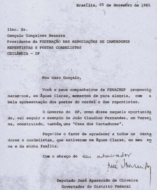 Carta de José Aparecido de Oliveira como governador do Distrito Federal sobre a Casa do Cantador do Distrito Federal e fala também na Casa do Cantador do Piauí feita com apoio do empresário João Claudino Fernandes.